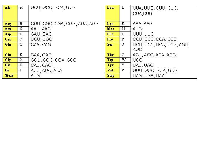 Tabella che illustra le triplette del codice genetico